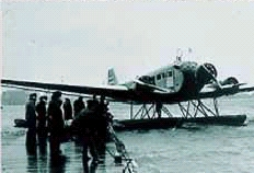 Junkers Ju 52 -lentokone Katajanokan lentosatamassa joskus välillä 1932–1936